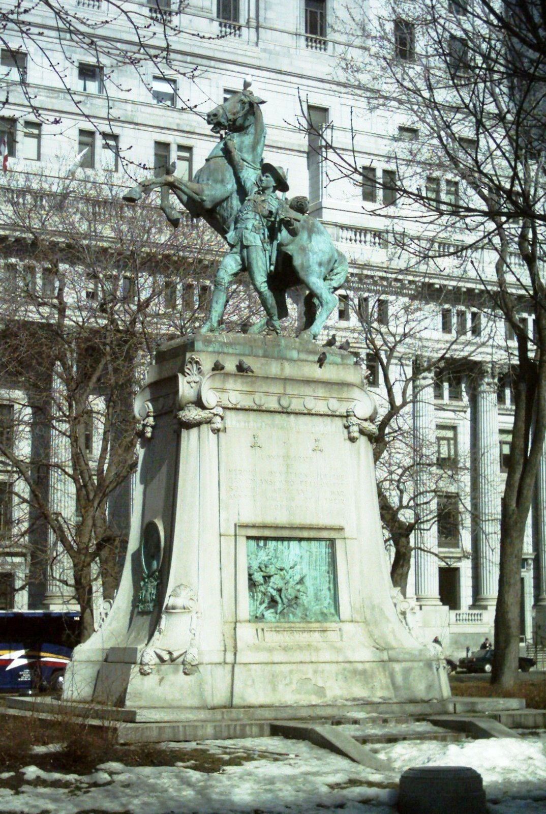 Monument aux héros de la guerre des Boers (1907), sculpture de George William Hill constituant le seul monument équestre à Montréal